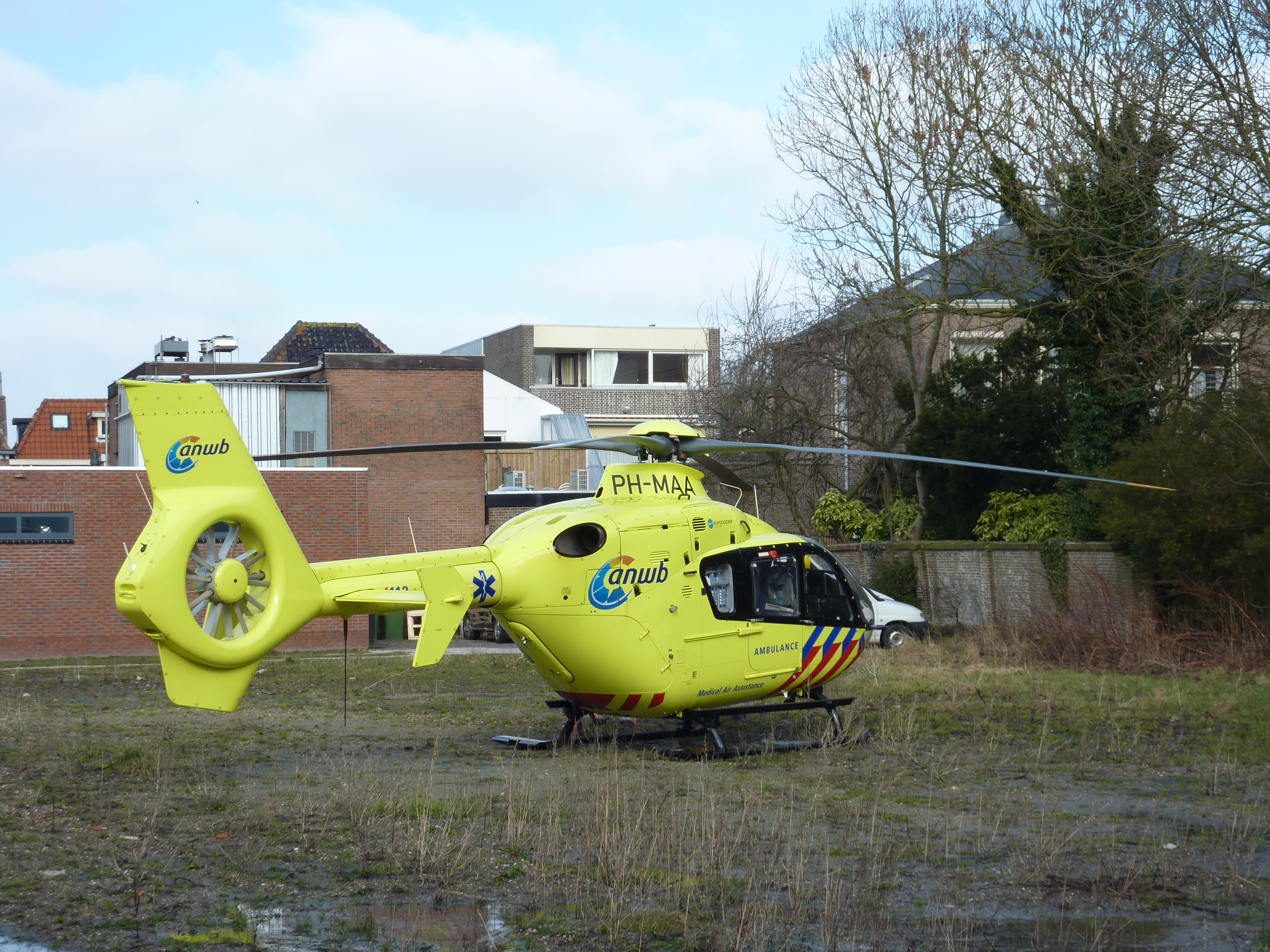 Reserve traumahelicopter van het type Eurocopter EC135 T2+ gestationeerd in Lelystad. Eigendom van het ANWB Medical Air Assistance (MAA)helikoptervliegbedrijf.